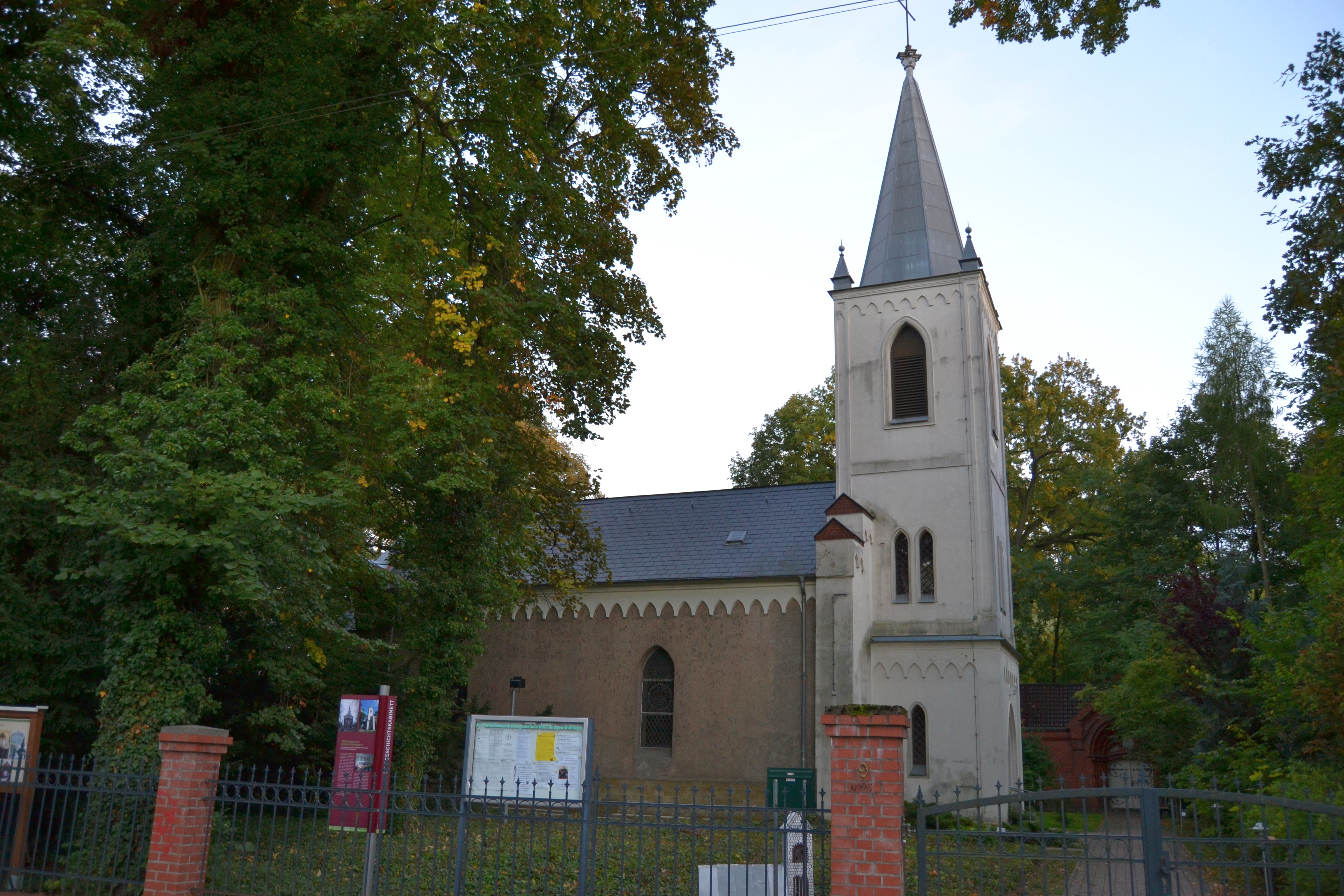 Dorfkirche Bollensdorf (zu Neuenhagen bei Berlin) mit Mausoleum der Familie Kelch.